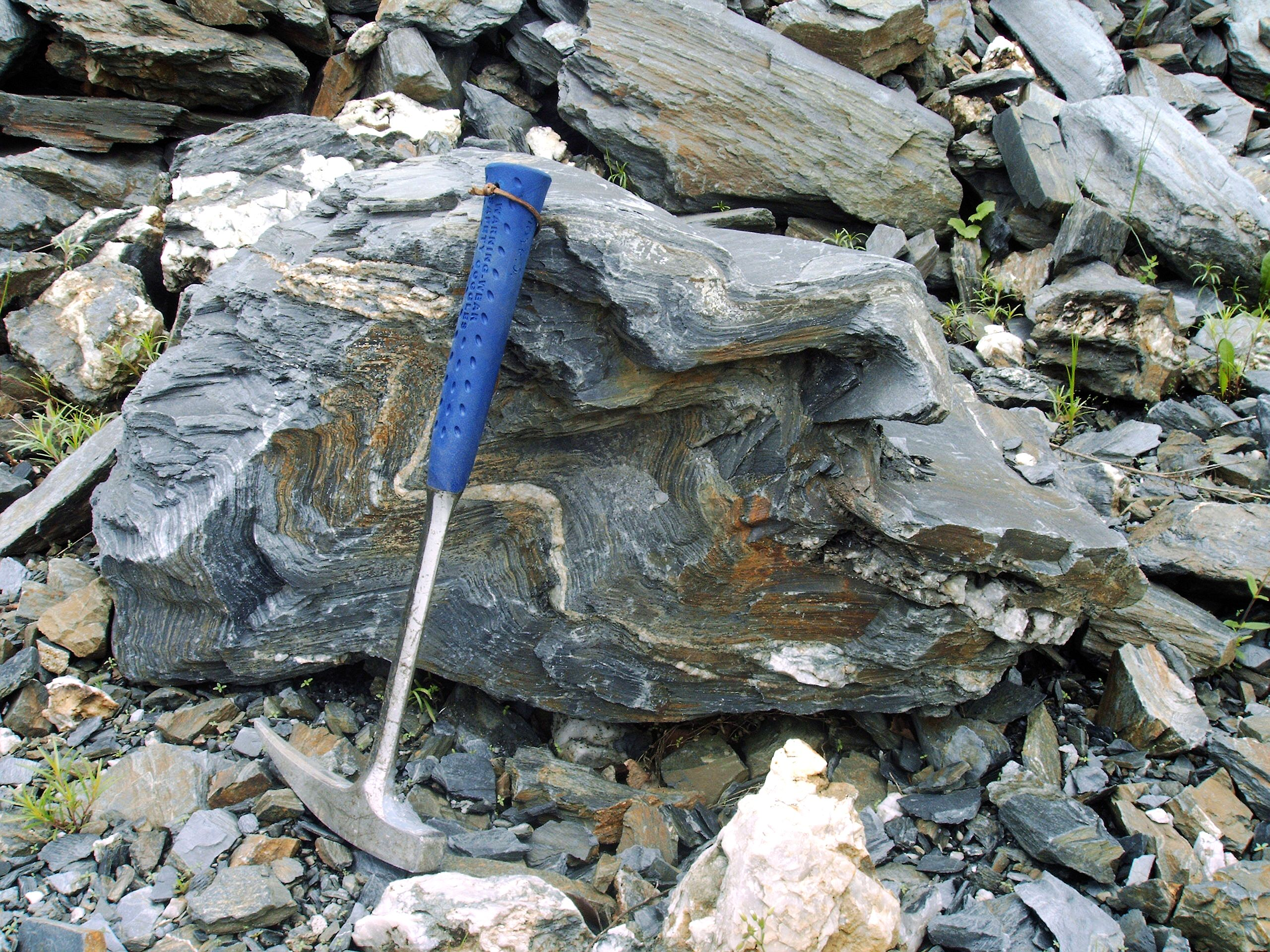 Metapyłowiec z widocznymi żyłkami kwarcu mlecznego intrudującymi między warstewkami fyllitu